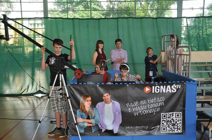 Pierwsza transmisja LIVE IgnaśTV